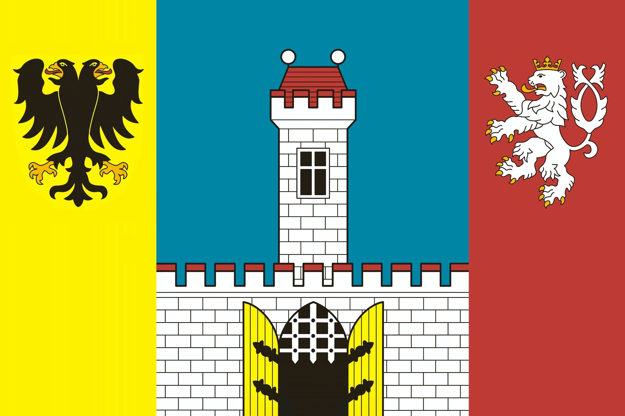 vlajka města Český Brod